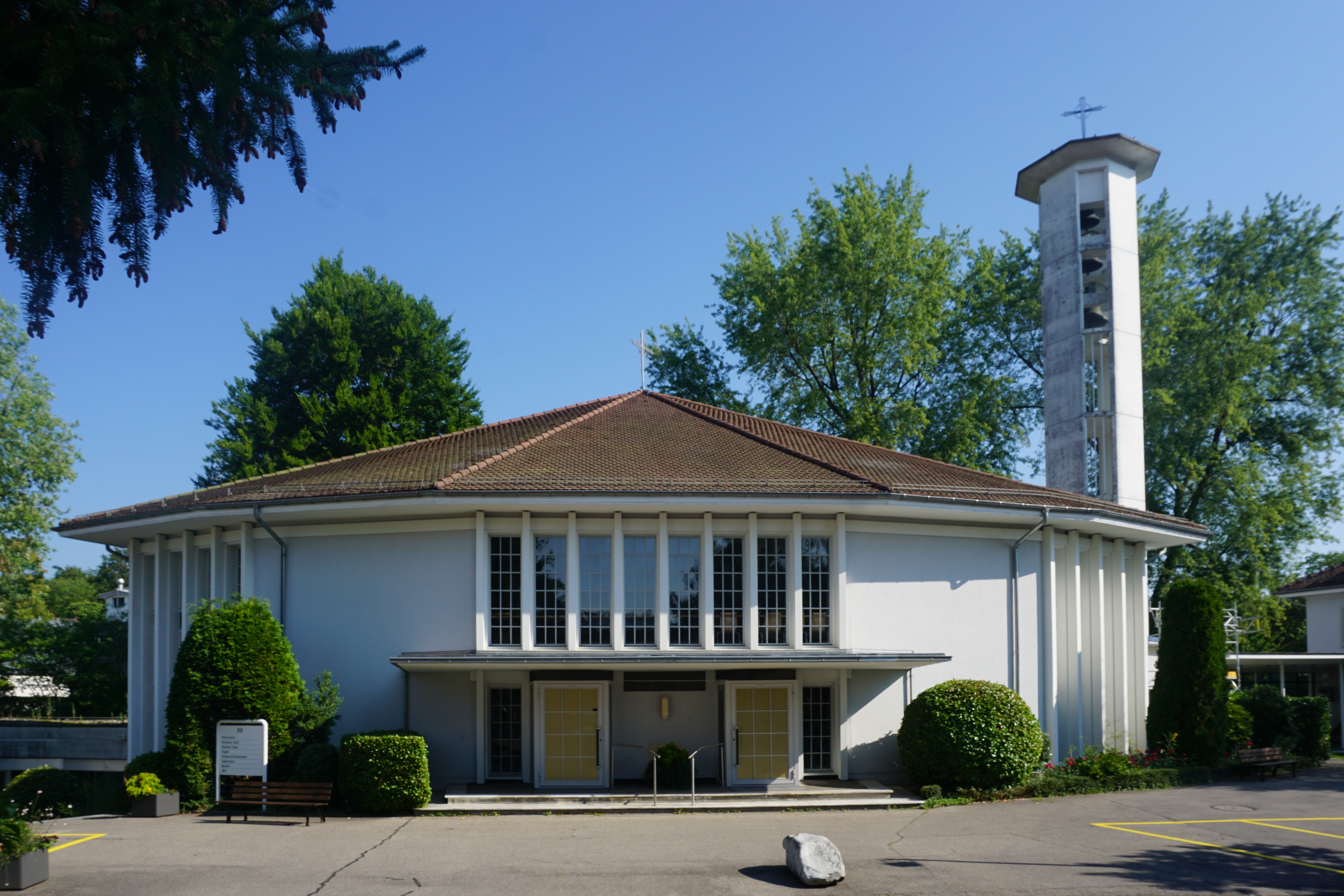 Kirche St. Franziskus, Zollikofen, Eingangsfront mit Turm